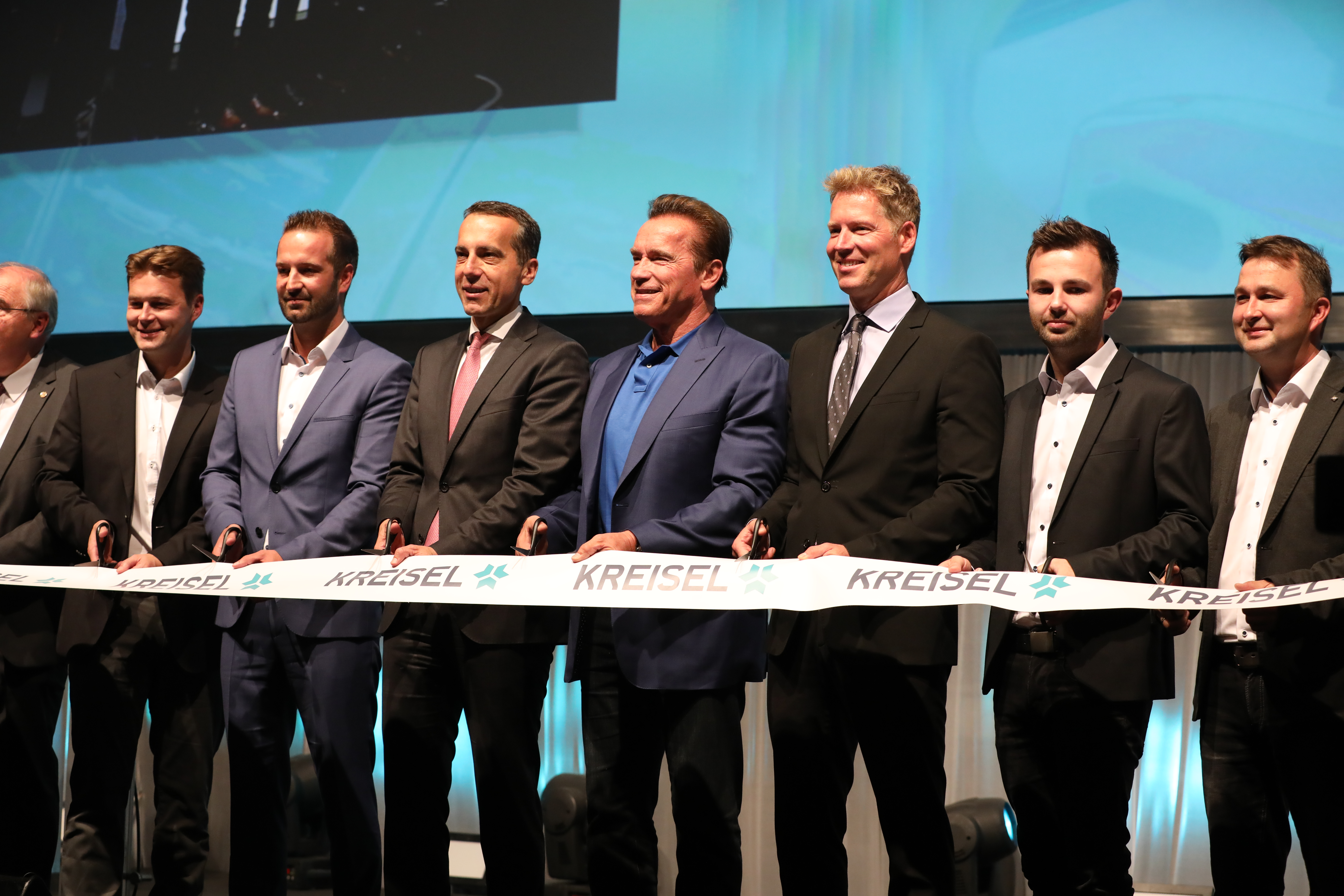 Am 19.9. war Bundeskanzler Christian Kern unterwegs in Oberösterreich. Gemeinsam mit Hollywood-Legende Arnold Schwarzenegger eröffnete Kern die neue Zentrale der Firma Kreisel Electric in Rainbach (Fotos: SPÖ/Zach-Kiesling).